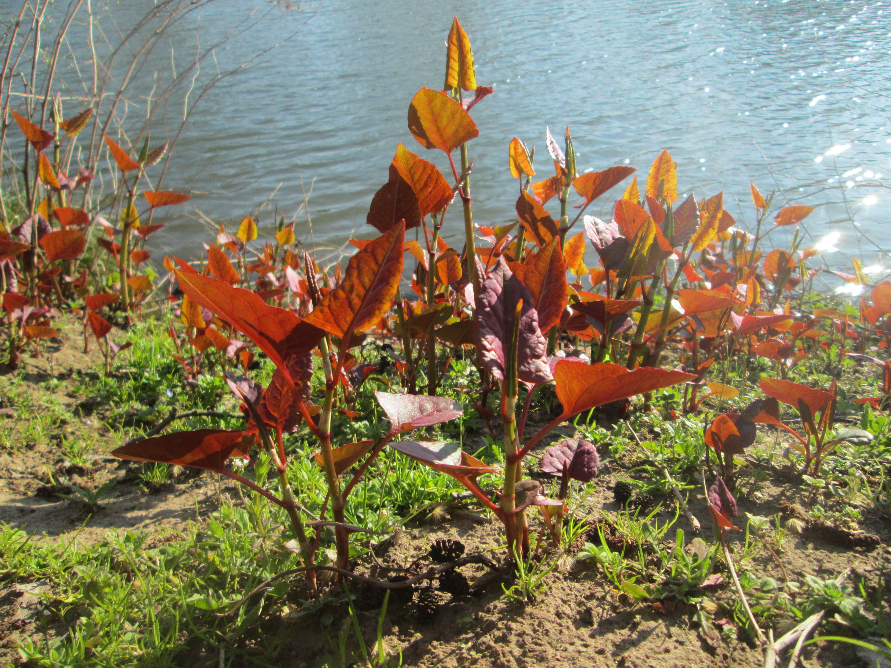 Bastard-Flügelknöterich oder Böhmischer Knöterich (Reynoutria × bohemica) an der Saar in Saarbrücken